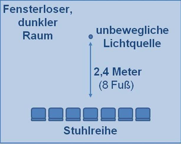 Diese Darstellung beschreibt den groben Versuchsaufbau des Versuchs von Jacobs und Campbell zum Generationenübergreifenden Einfluss.